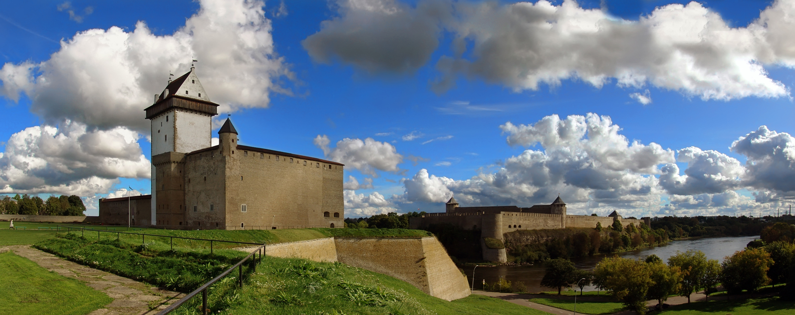 Нарвский замок и Ивангородская крепость